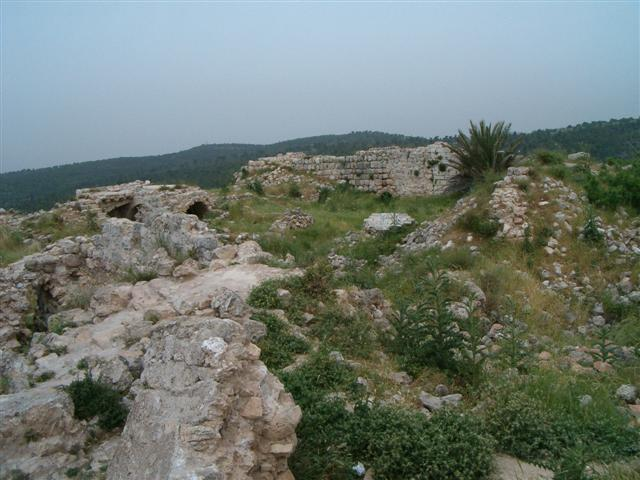 Bayt 'Itab, Jerusalem District